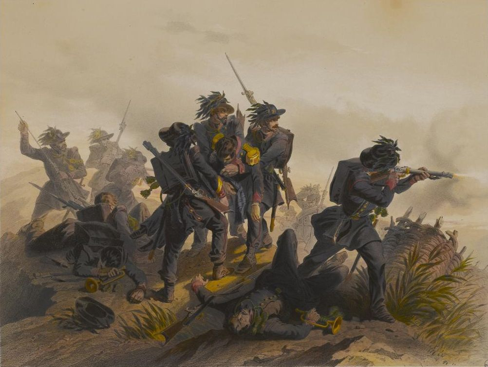 Scontro di Rivoli, episodio della Battaglia di Custoza (22-27 luglio 1848)